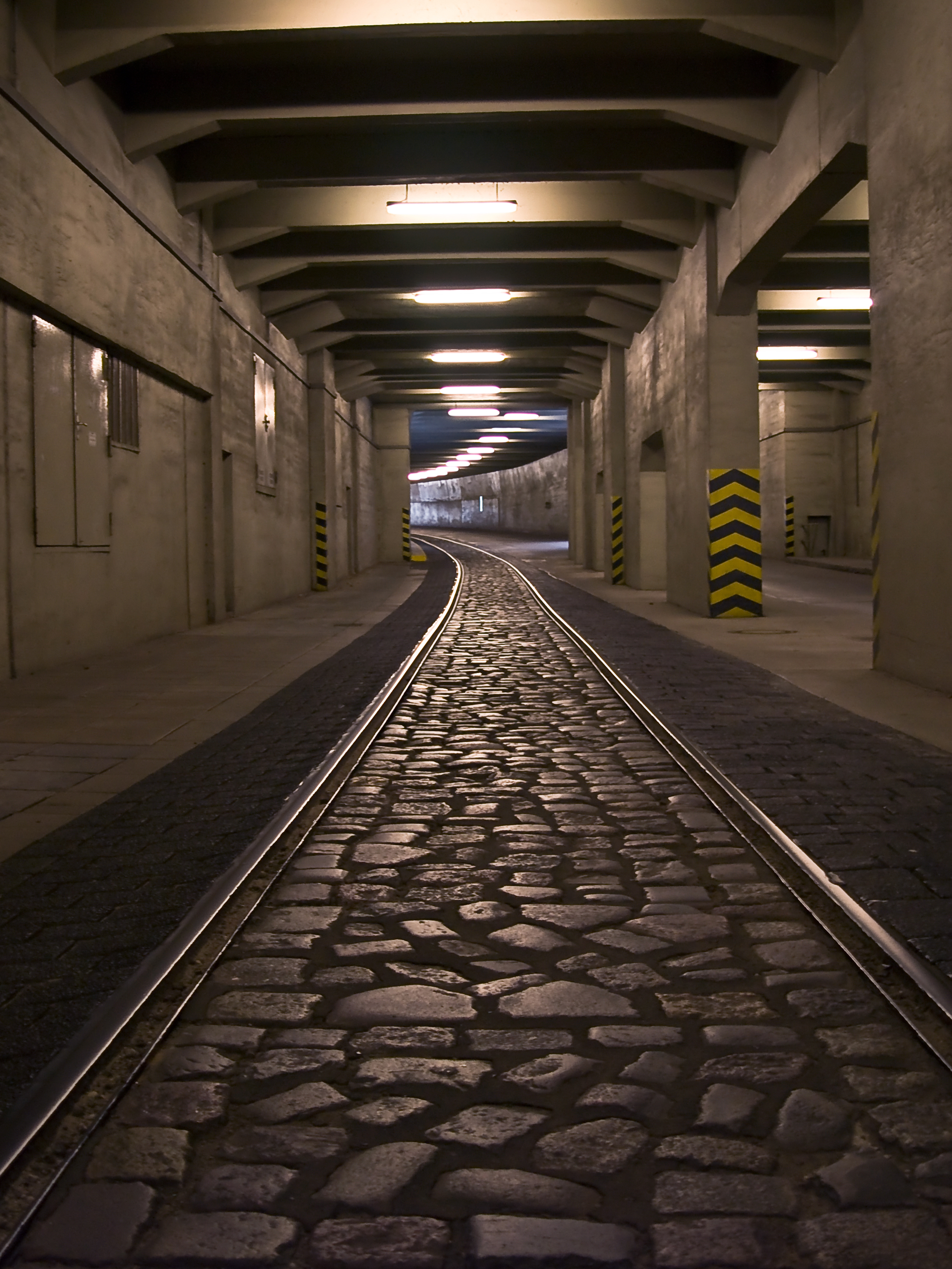 Bahntunnel unter Flughafengebäude Tempelhof, Blick nach Süden